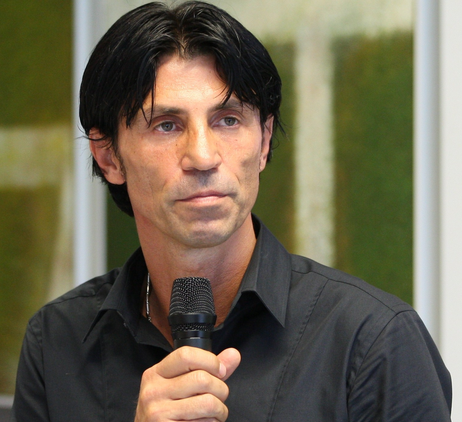 Bruno Hübner bei der Vorstellung der neuen sportlichen Leitung im Eintracht Frankfurt Museum 2011